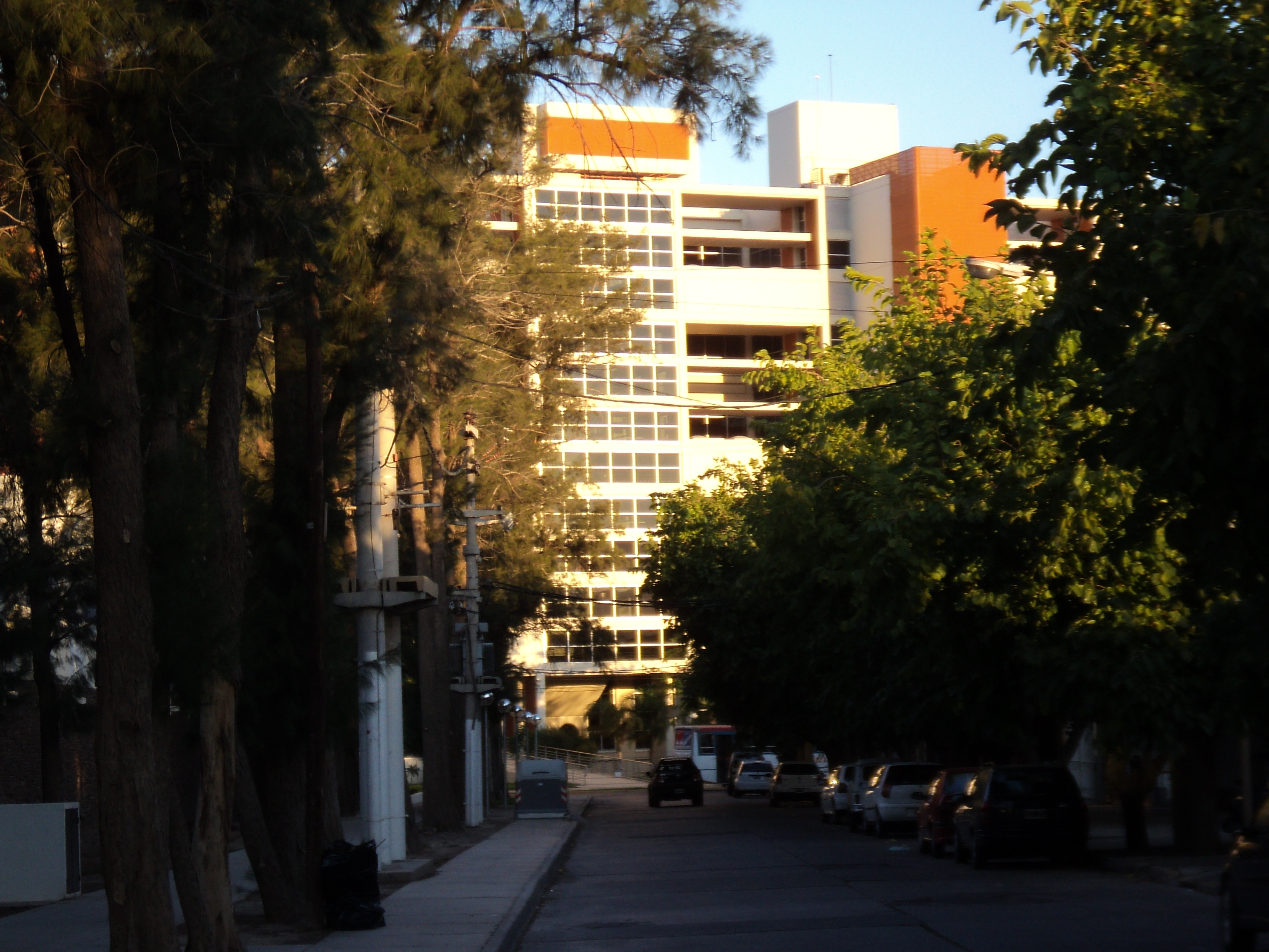 Desde la calle Rivadavia se dislumbra el centro cívico con una latura similar a un efificio de 12 pisos